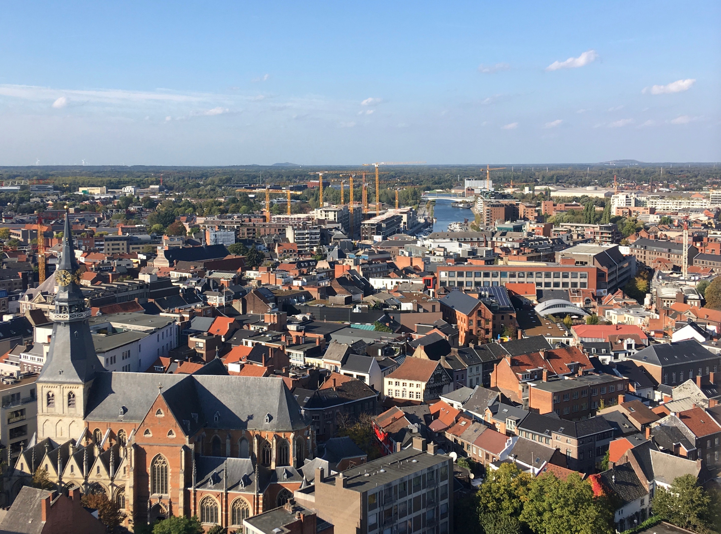 Panorama Hasselt: stadscentrum met Sint Quintinuskathedraal en Blauwe Boulevard